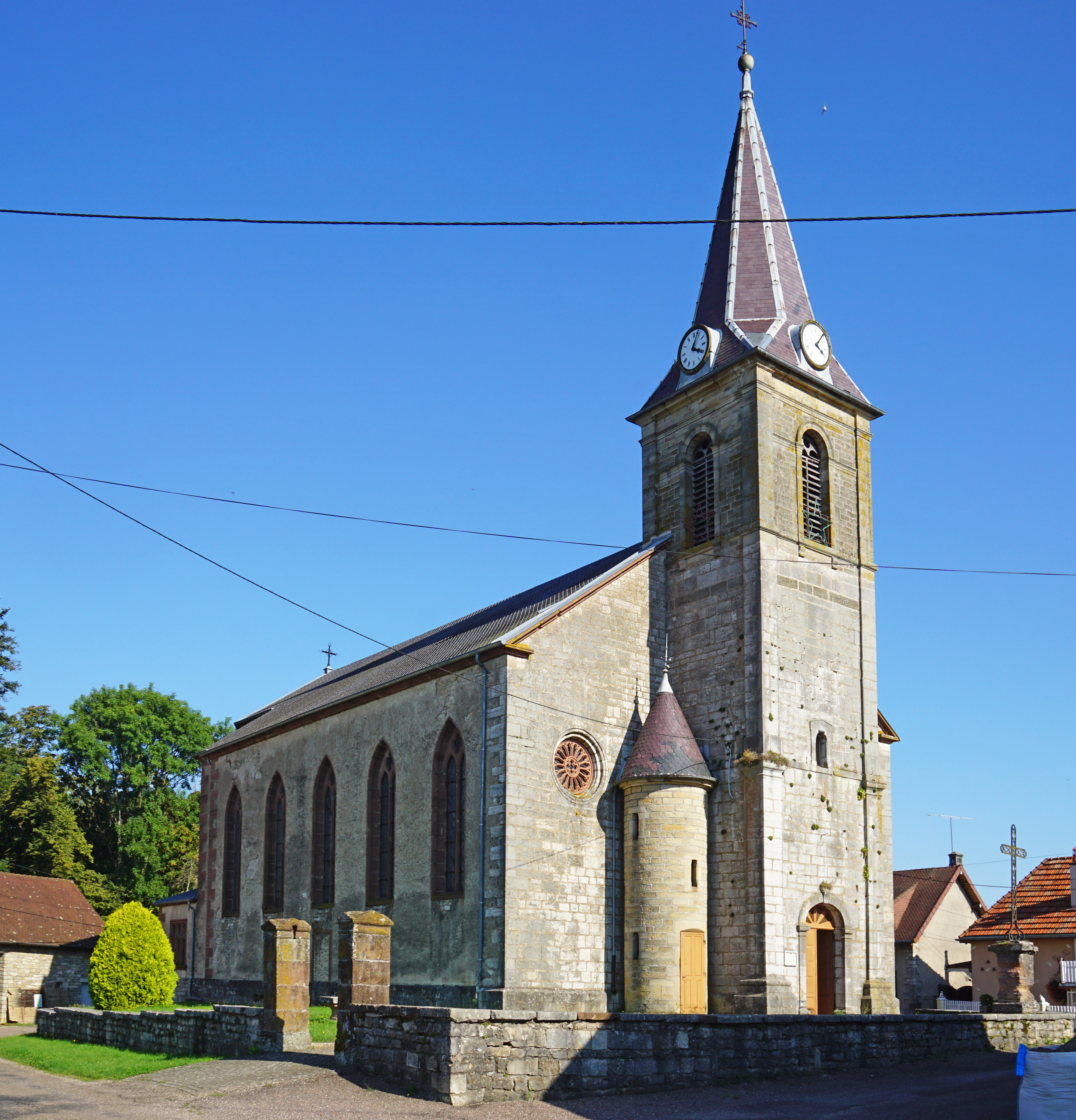 L'église de Fallon (Haute-Saône).